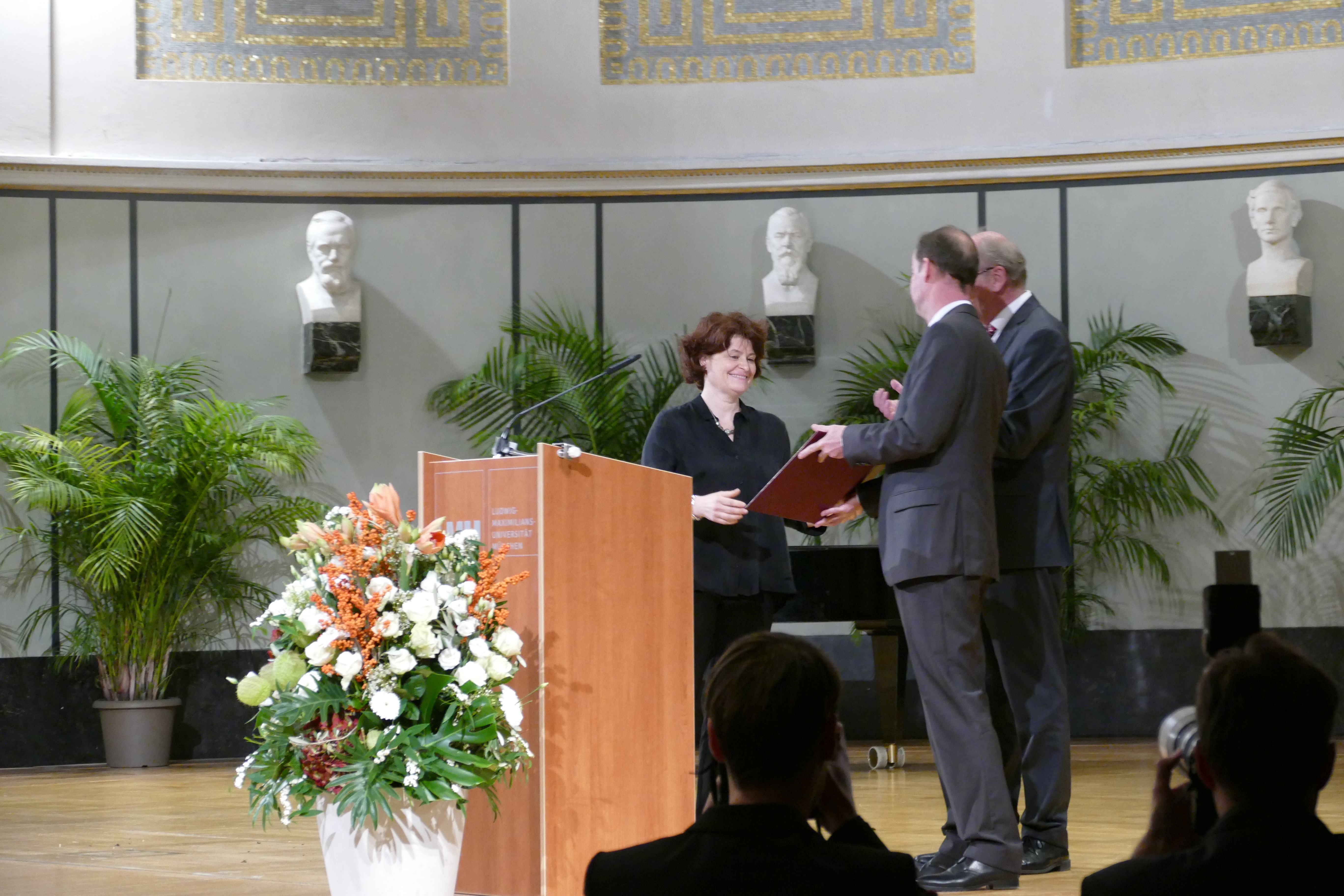 Verleihung des Geschwister-Scholl-Preises am 21.11.2016 an Garance Le Caisne für ihr Buch "Codename Caesar" durch Michael Then, Vorsitzender des Börsenvereins des Deutschen Buchhandels - Landesverband Bayern e. V. und Dr. Hans-Georg Küppers, Kulturreferent der Stadt München in der Großen Aula der Ludwig-Maximilian-Universität.